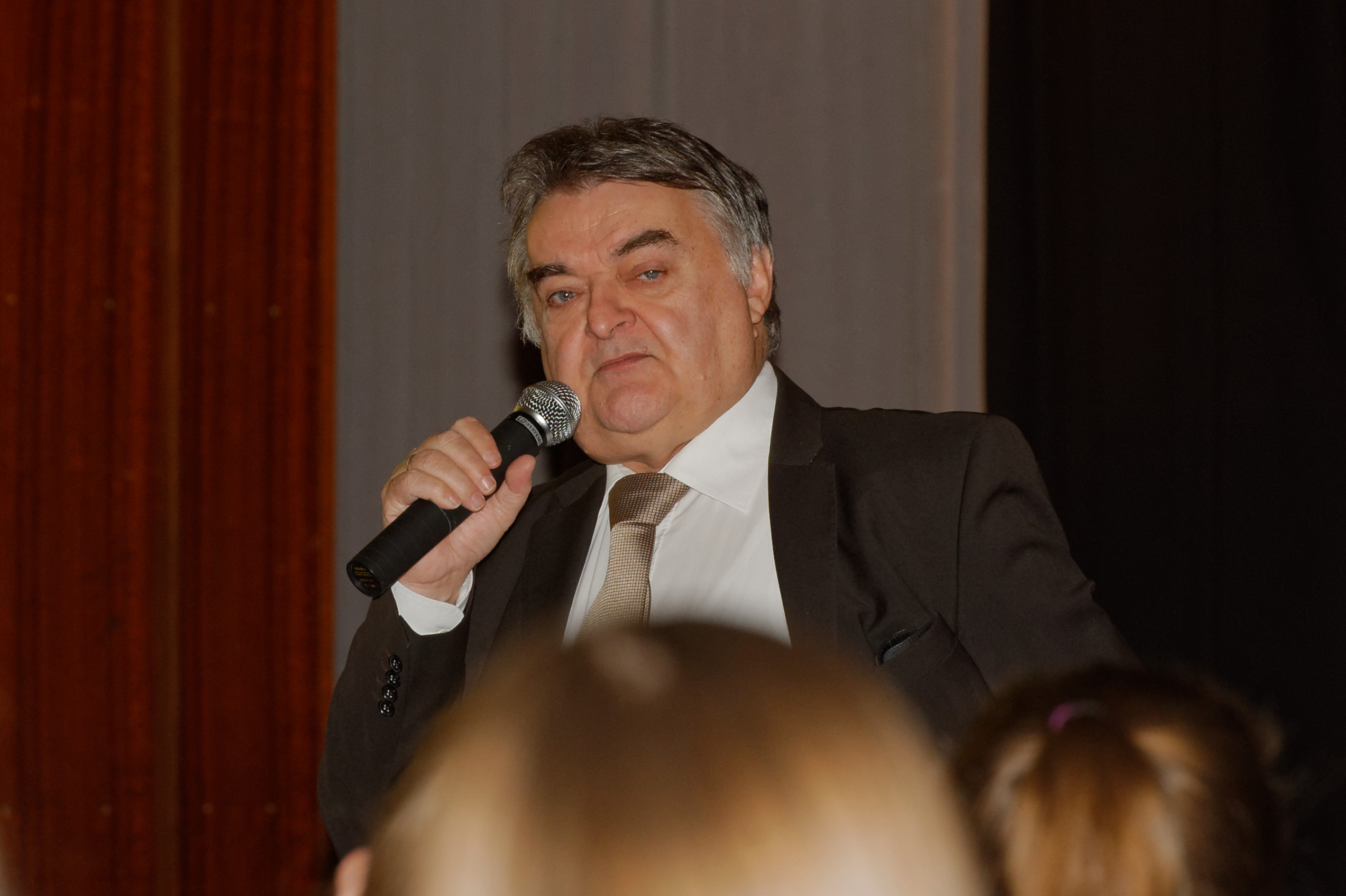 Herbert Reul am Freiherr vom Stein-Gymnasium Leverkusen anlässlich des Europatages 2015